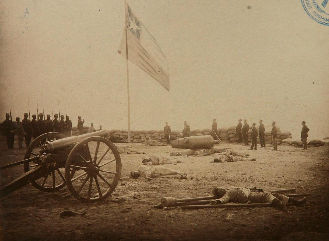 La toma del Morro de Arica por tropas chilenas. La Guerra del Pacífico, también denominada Guerra del Guano y Salitre, fue un conflicto armado acontecido entre 1879 y 1883 en el cual se enfrentaron la República de Chile contra las repúblicas de Bolivia y del Perú.